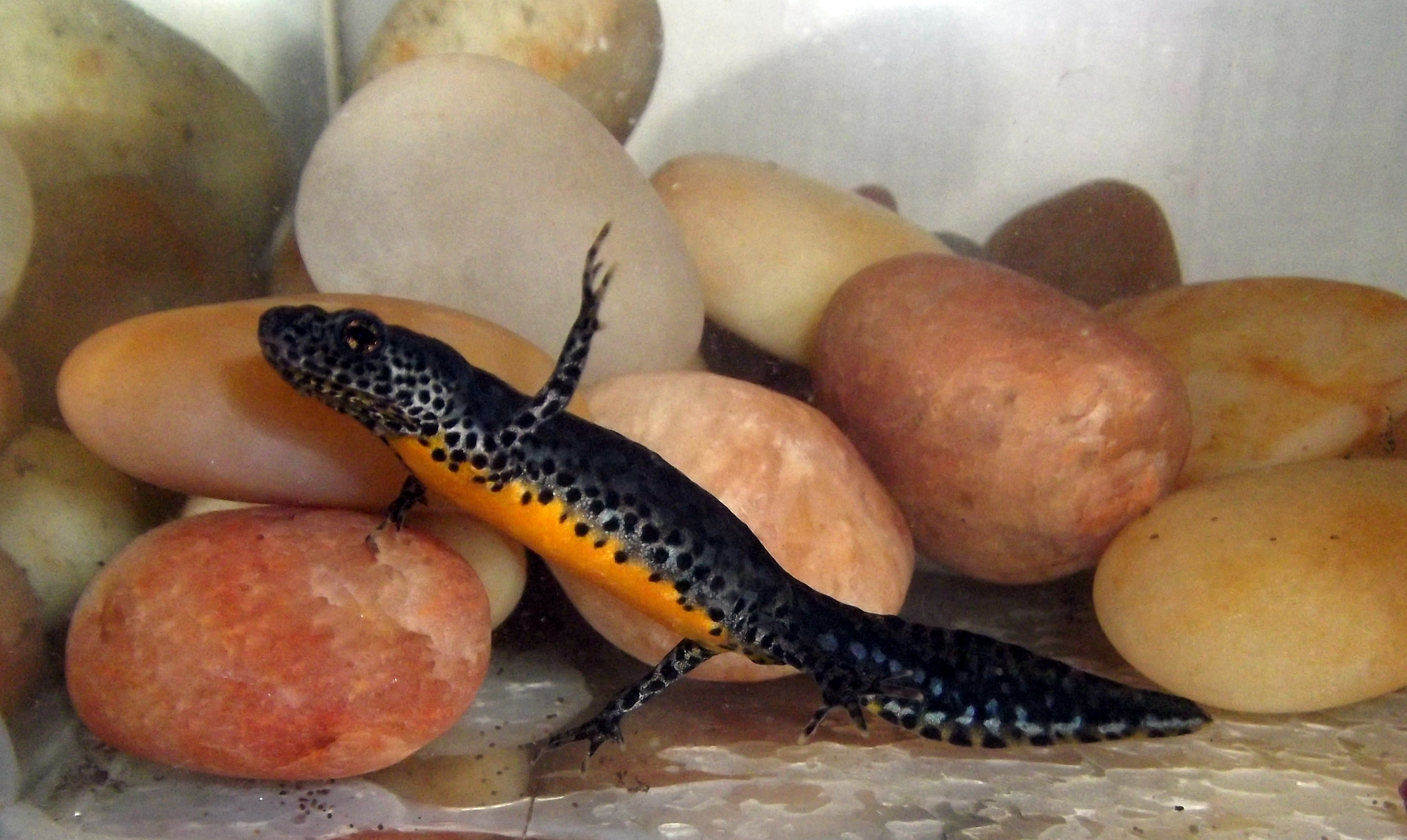 Macho